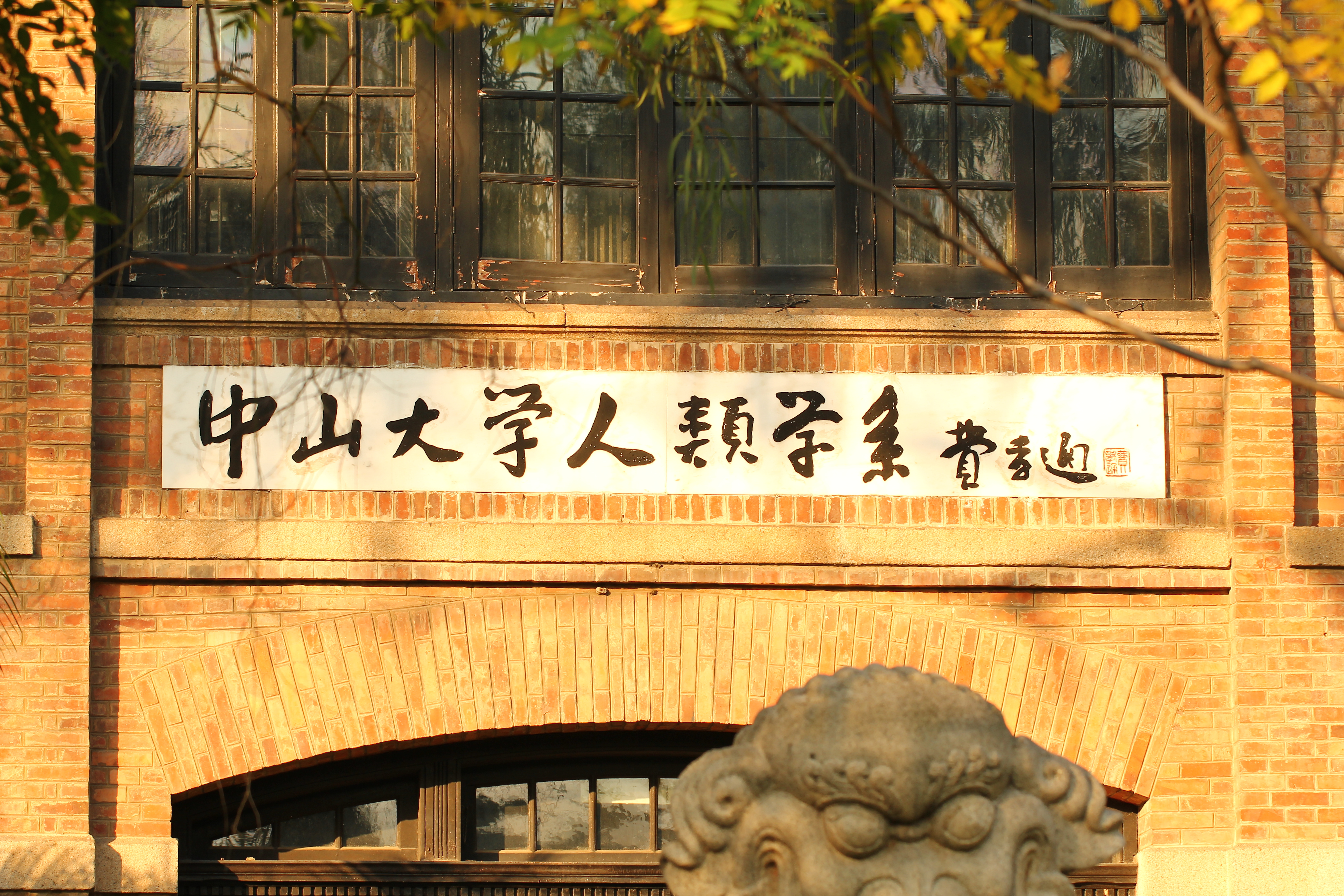 私立嶺南大學馬丁堂建築。文化大革命期間原門楣「MARTIN HALL」被毀，後再被塗抹成費孝通題寫的“中山大学人類学系”。